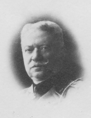 Ritratto del senatore Alessandro Saporiti